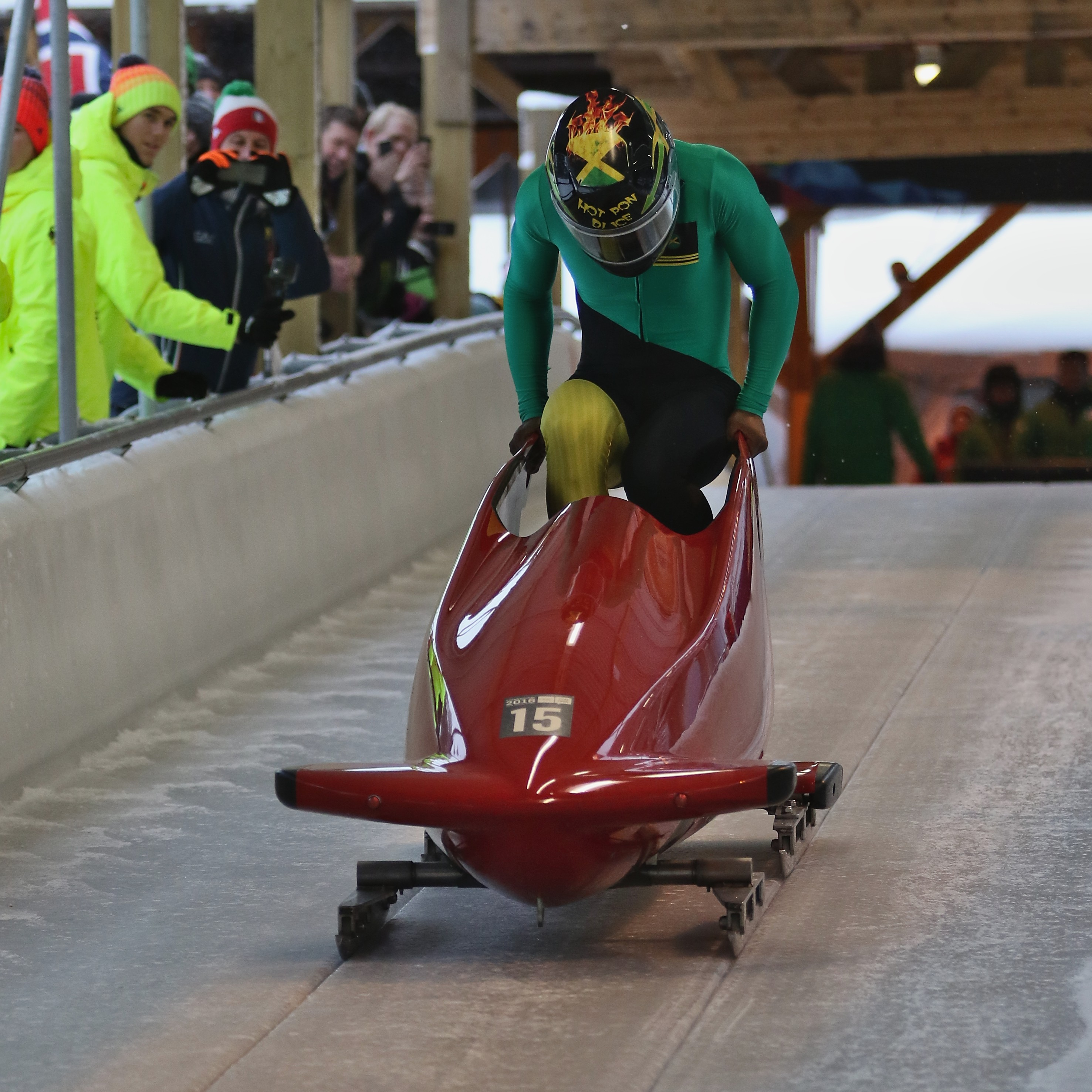 Lillehammer 2016 Bob men - MAYHEW Daniel